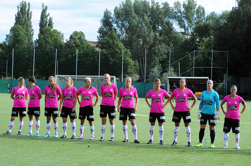 Kopparbergs/Göteborg FC squad